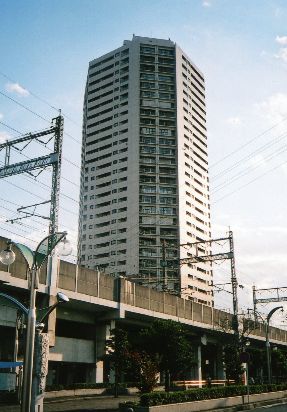 埼玉県さいたま市中央区の高層マンションびゅうサイトタワー、2008年12月中旬に利用者が撮影